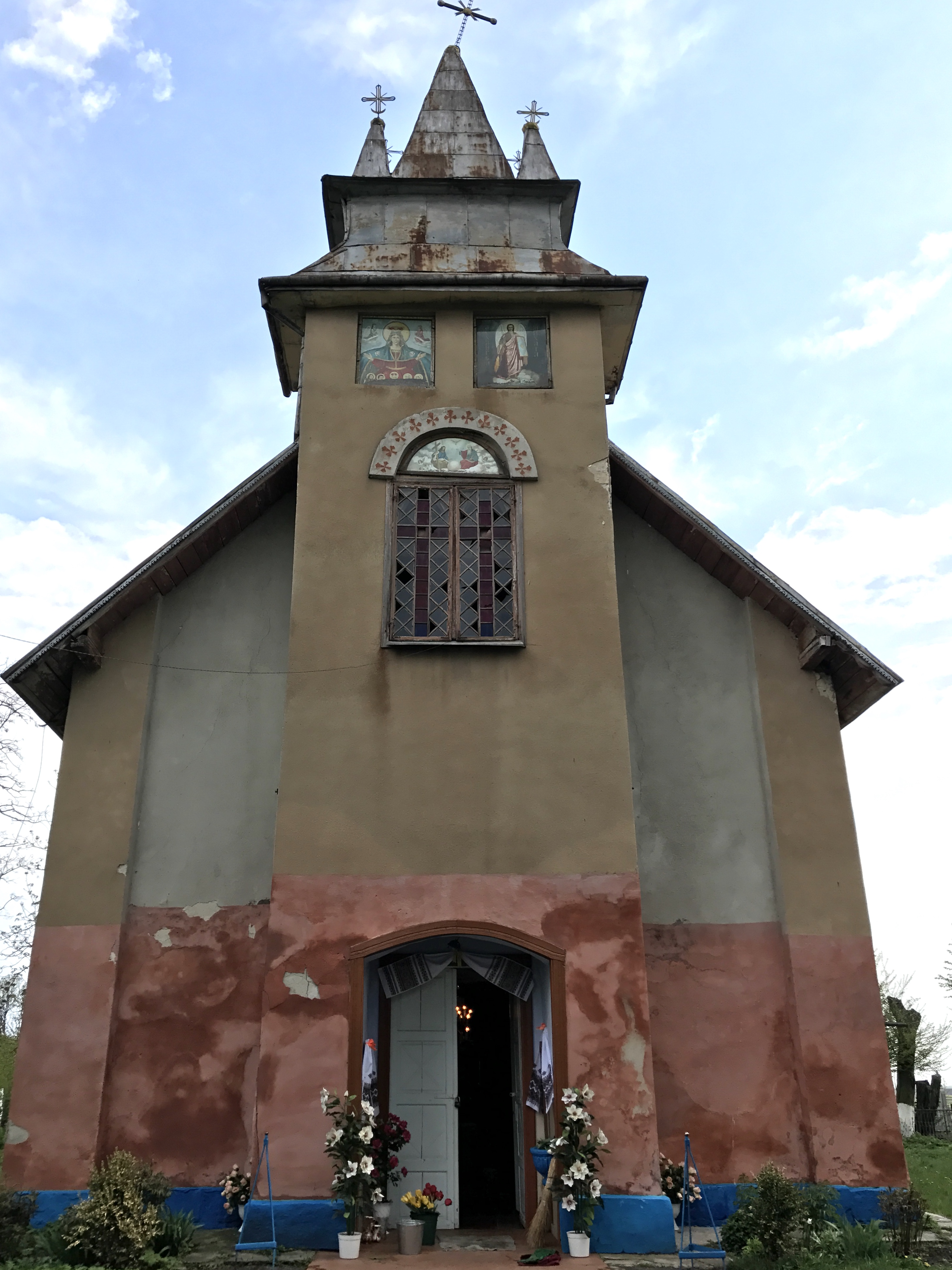 Фронтон будівлі діючої церкви Св. Михаїла УГКЦ у с. Вівся Козівського району Тернопільської області. Збудована 1870 р.